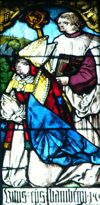 Fenster des Bischofs von Bamberg: Darstellung von Heinrich III. Groß von Trockau